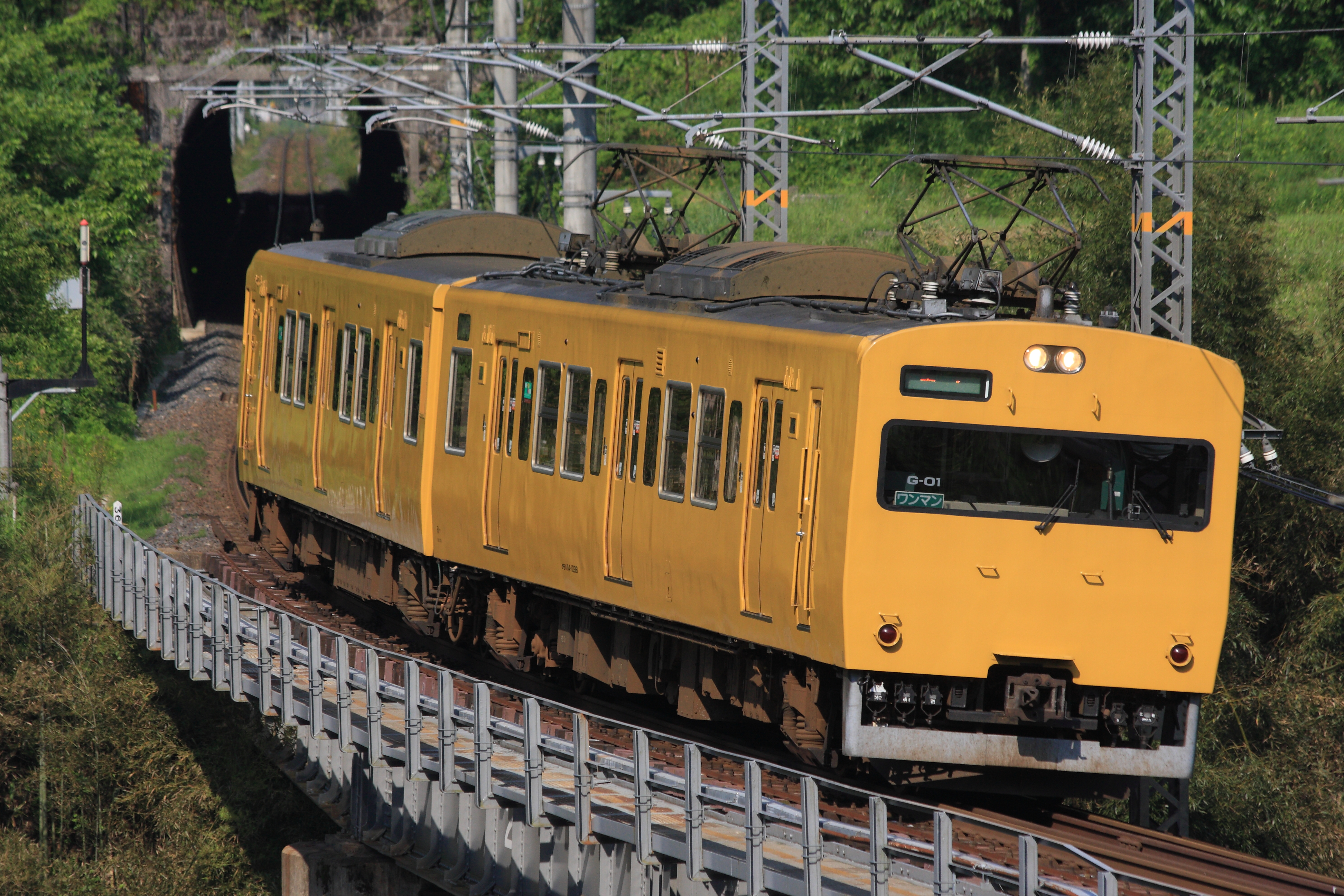 JR西日本115系G01編成 伯備線、根雨-黒坂